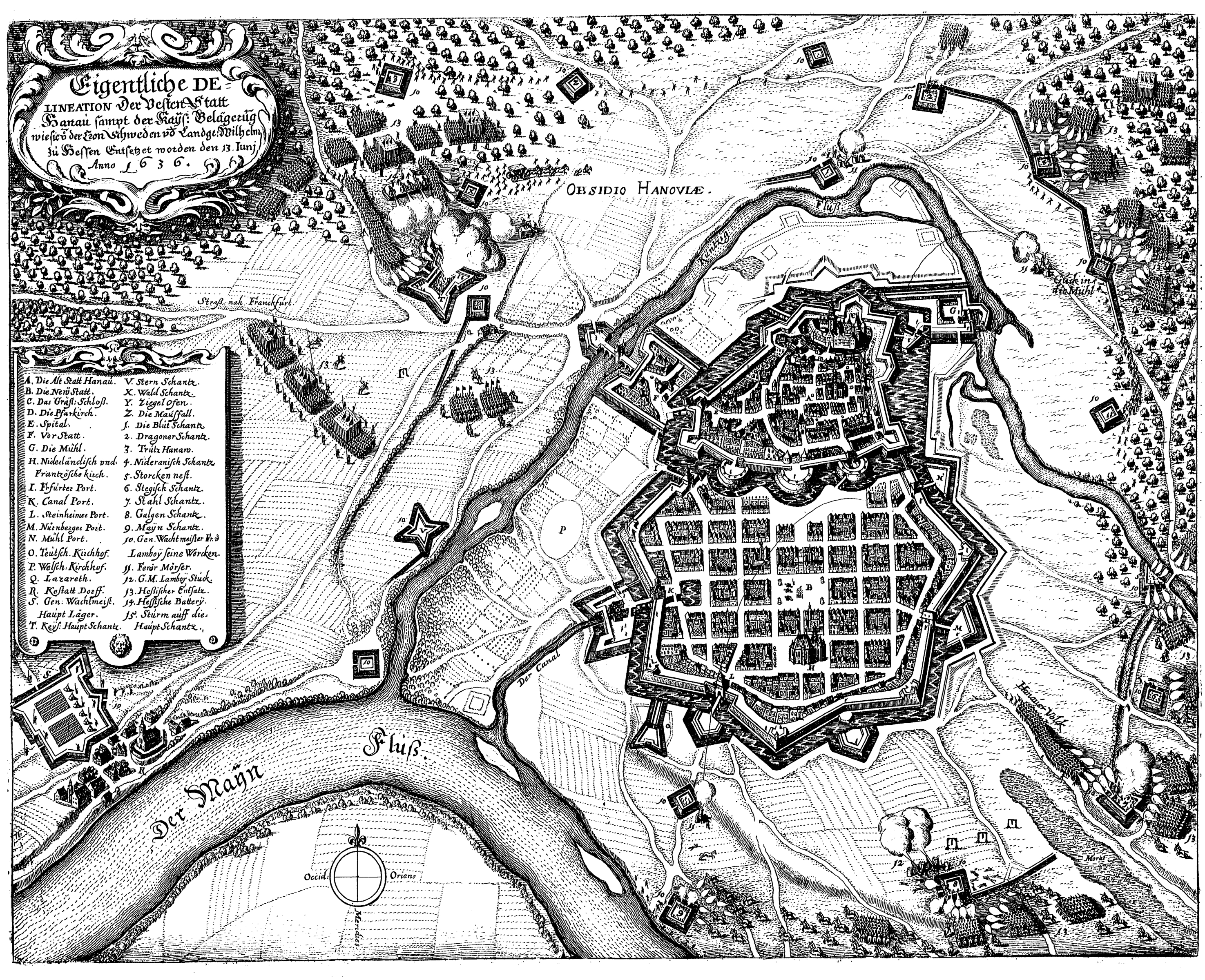 Eigentliche Delineation der Vesten Statt Hanau sampt der kays. Belagerung wie sie von d. Kron Schweden und Landgr. Wilhelm zu Hessen entsetzt worden den 13. Juni Anno 1636 ; Belagerung der Stadt Hanau durch kaiserliche Truppen unter Lamboy im Dreißigjährigen Krieg. Hessisch-schwedischer Entsatzangriff 1636 im Theatrum Europaeum.